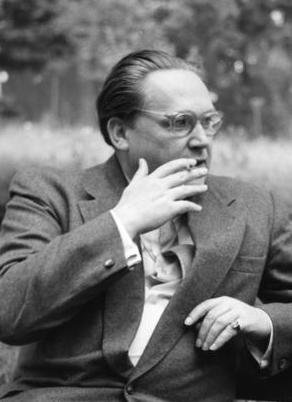 Juli 1957 12. Internationale Ferienkurse für neue Musik, Darmstadt Dr. Wolfgang Steinecke im Gespräch mit Professor Heinz Dressel (Direktor der Folkwangschulen Essen) Information added by Wikimedia users.Wolfgang Steinecke